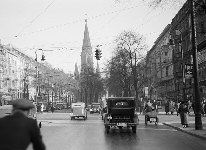 Berlijn. Kurfürstendamm met autoverkeer en met op de achtergrond de Kaiser-Wilhelm-Gedachtniskirche.